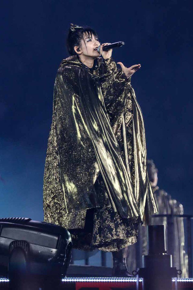 SU-METAL @ BABYMETAL東京ドーム公演『黒い夜』